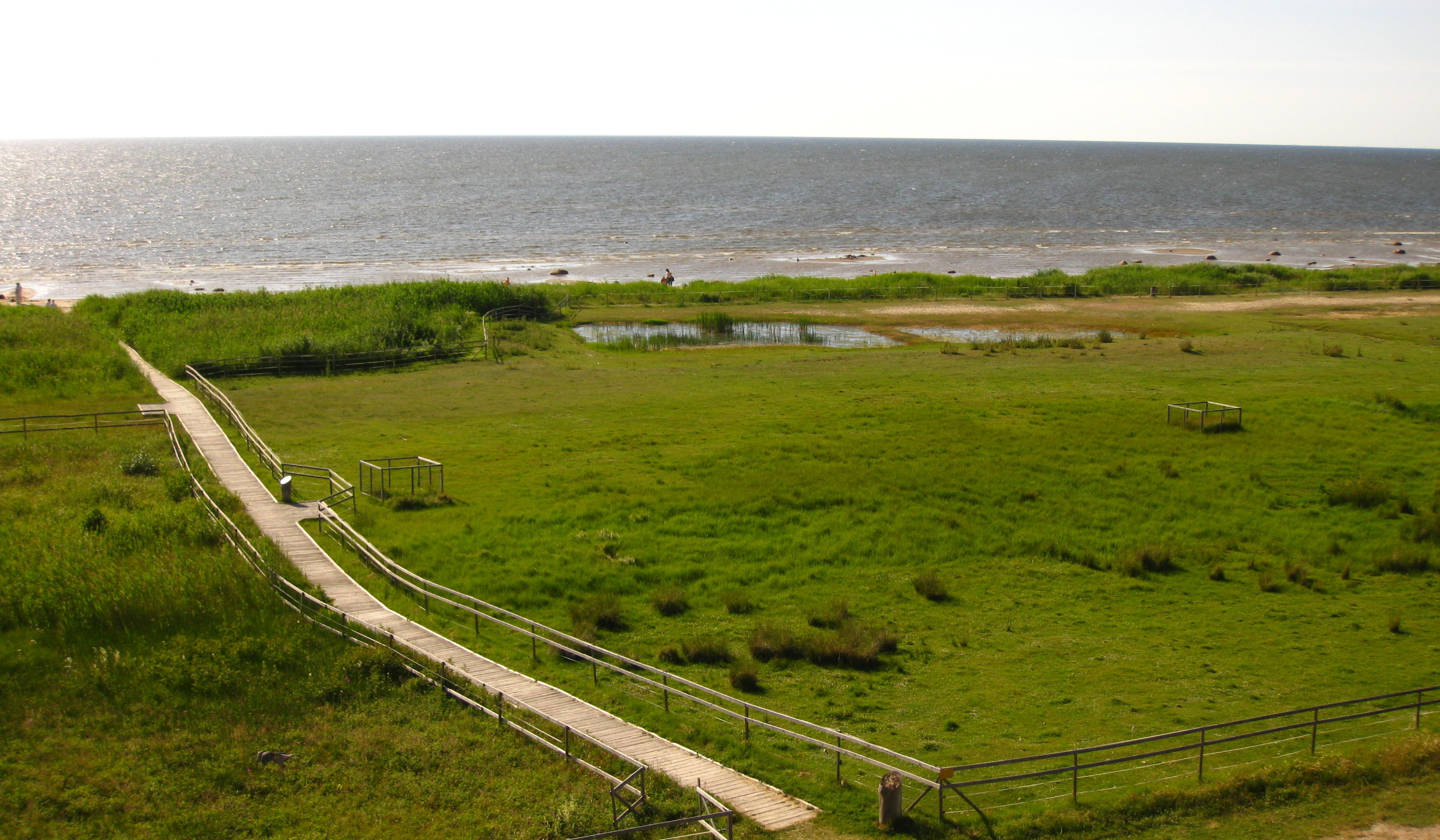 Kabli Looduskaitseala Kabli linnutornist